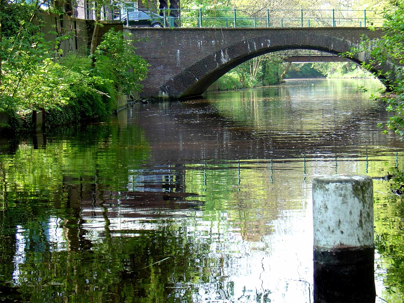 Stadsgracht van Emden (Stadtgraben von Emden)